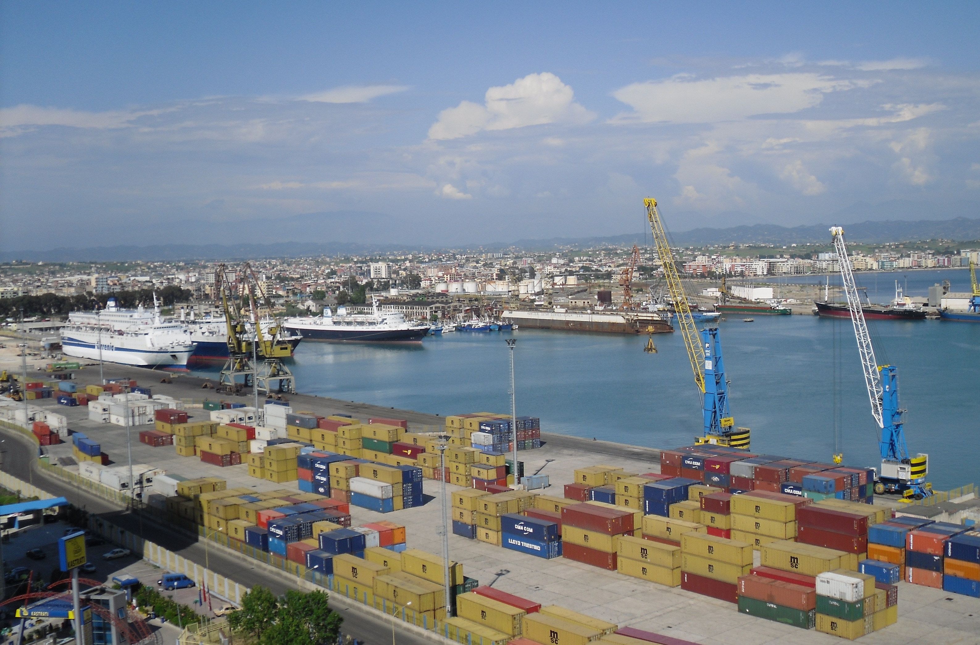 Porti i Durresit